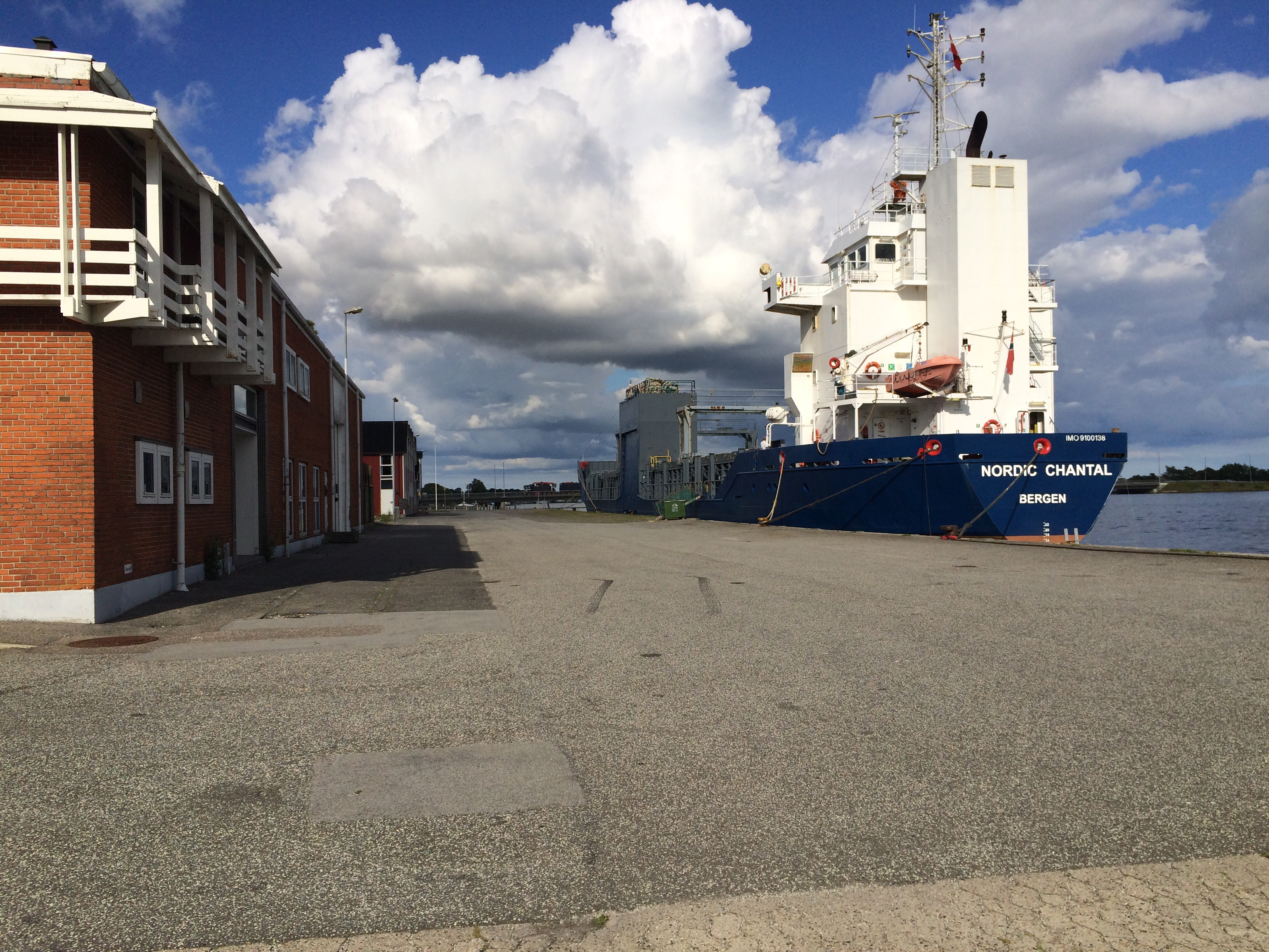 Nordic Chantal i Hadsund Havn